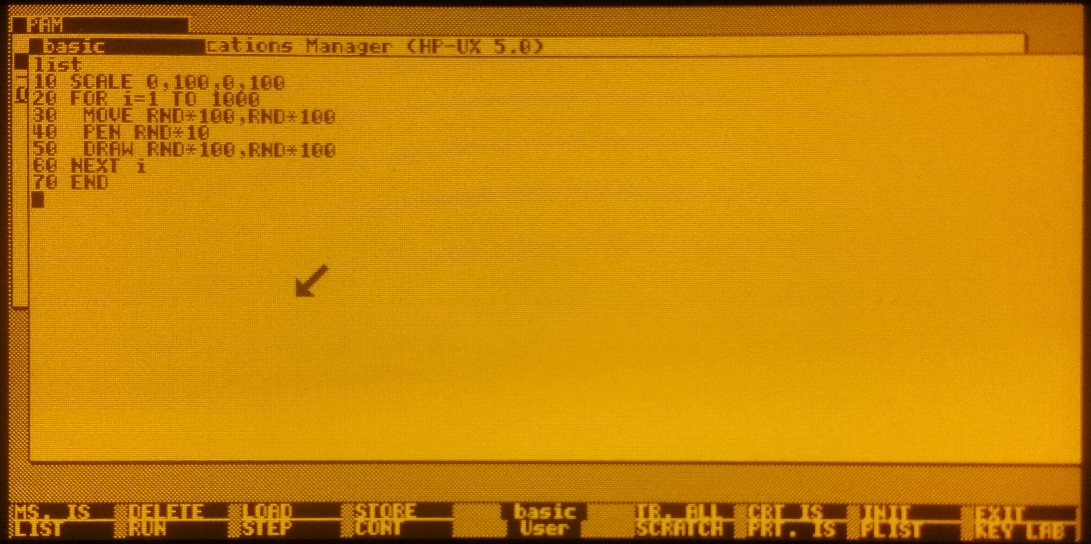 Elektro-Luminiszenz-Display des HP-Integral PC